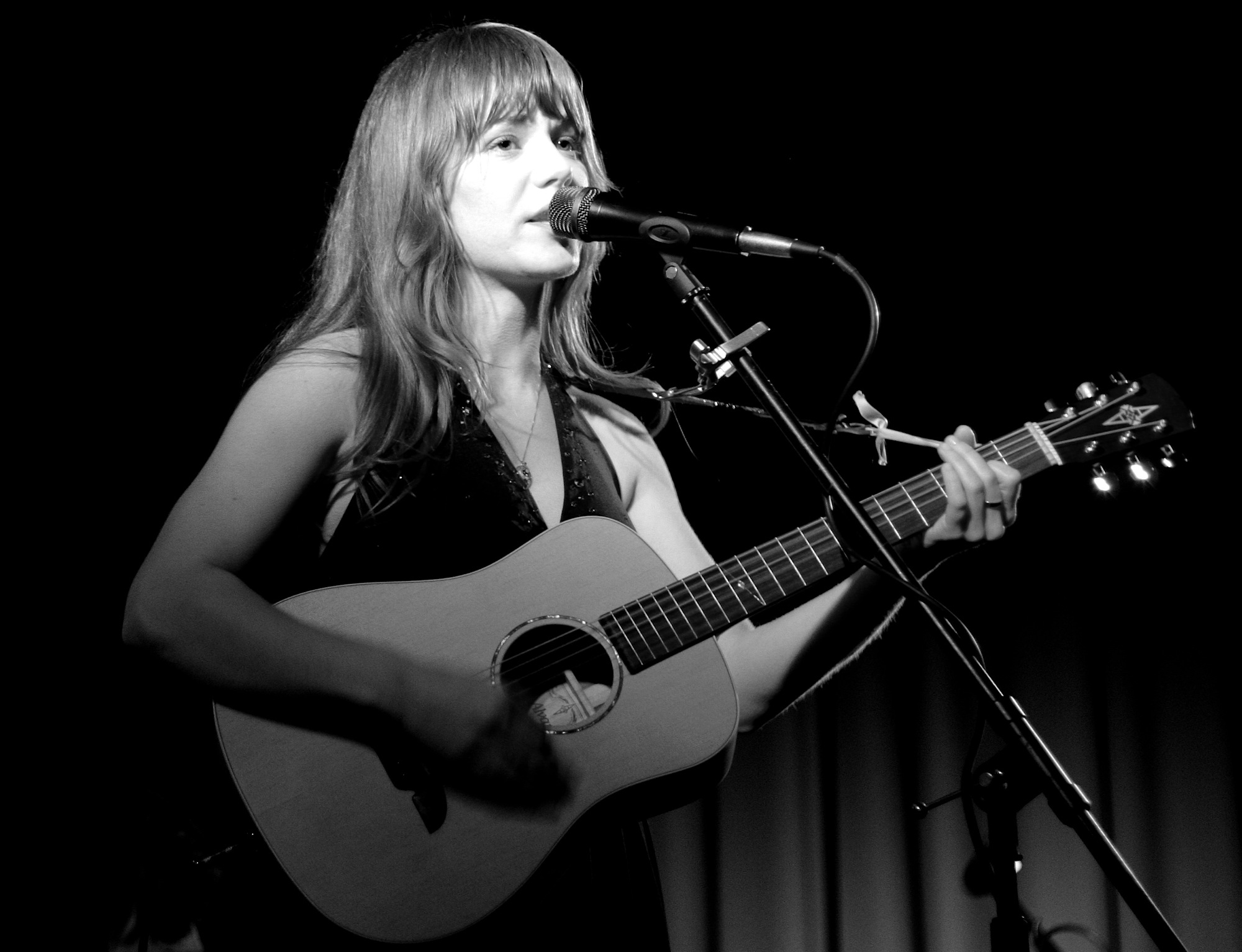 Jenny Lewis